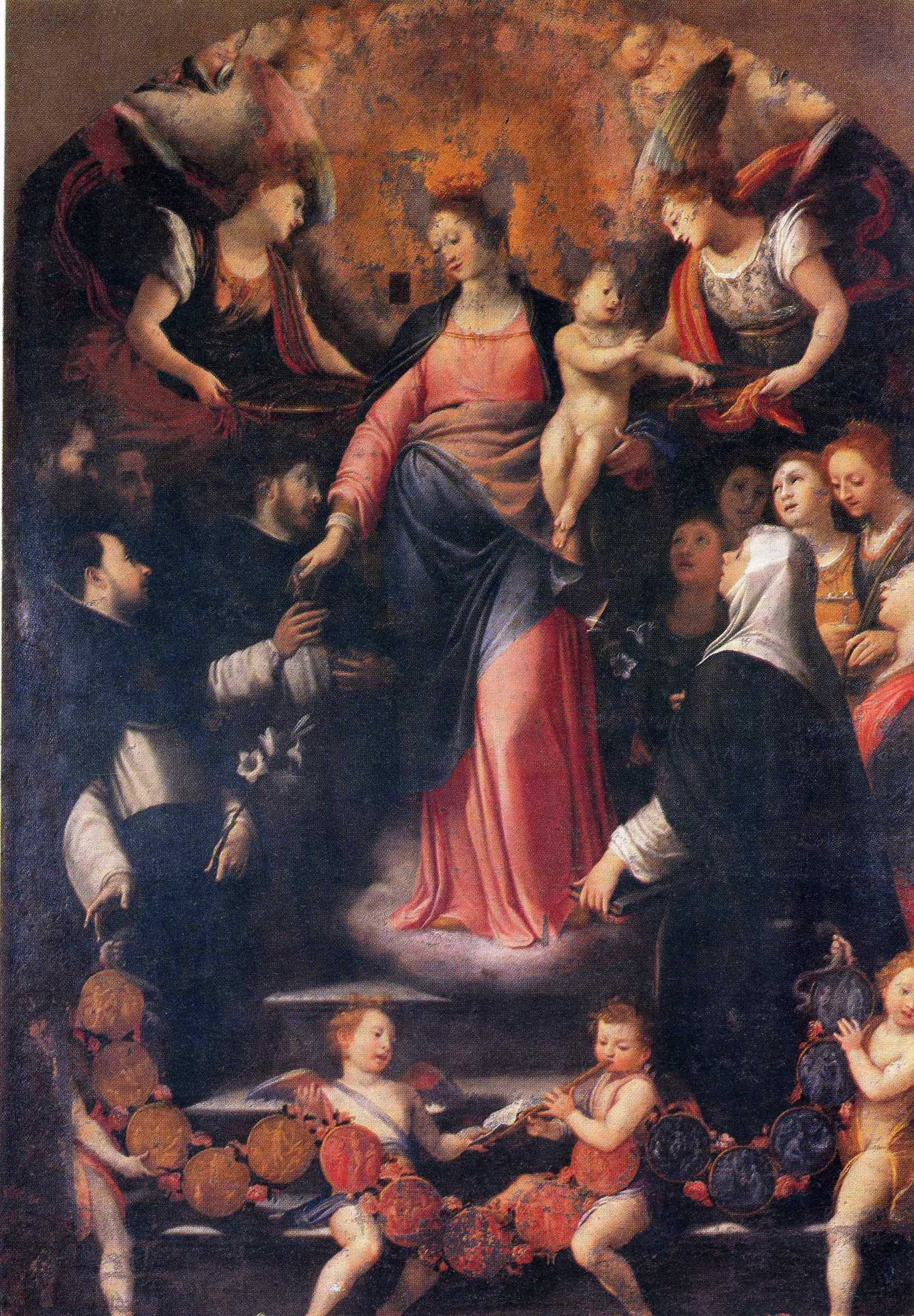 dipinta da Fiumedinis